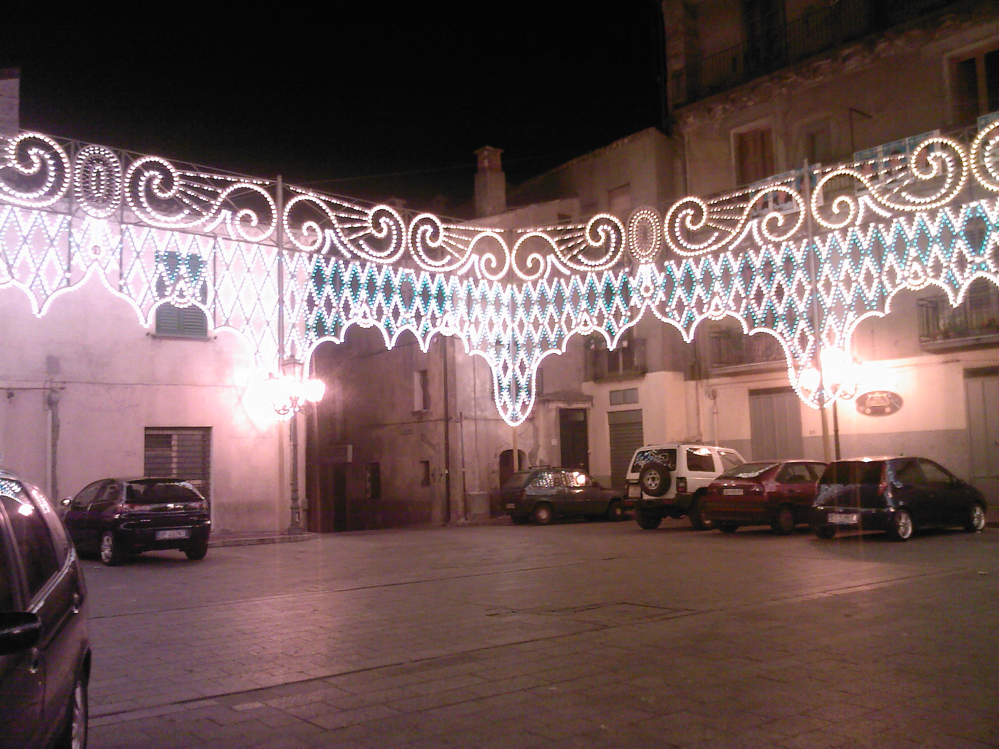 San Giovanni in Fiore. Piazza Abate Giocacchino con le luminarie per la festa di San Giovanni Battista